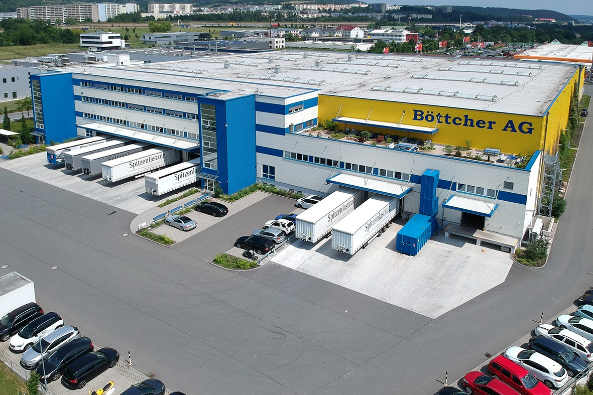 Unternehmenssitz in Jena